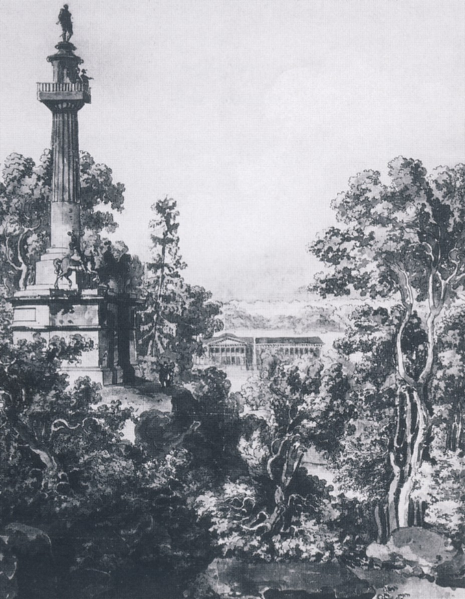 Planerat utsiktstorn i Hagaparken i Solna